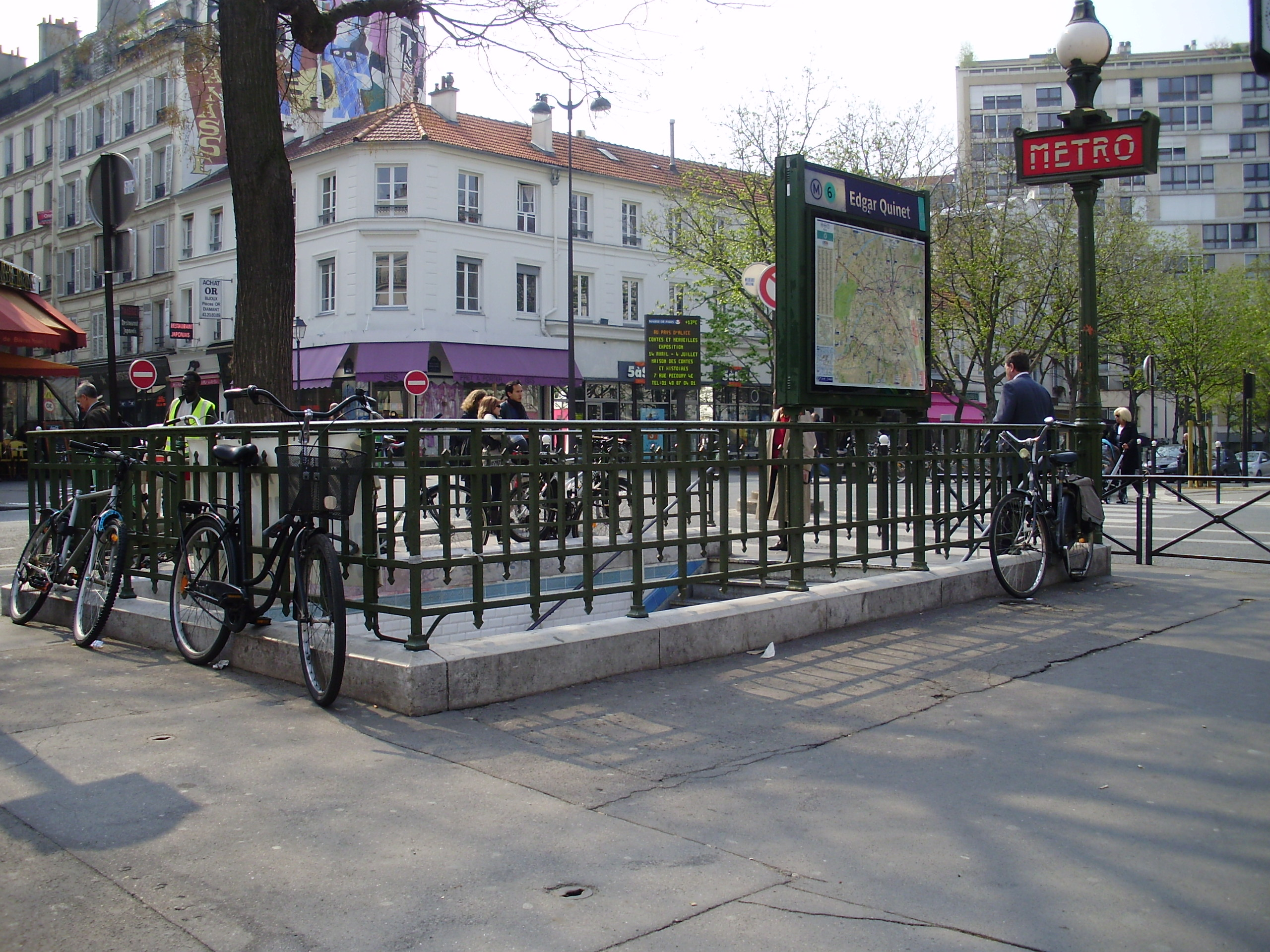 Entrée de la station Edgar Quinet du métro de Paris